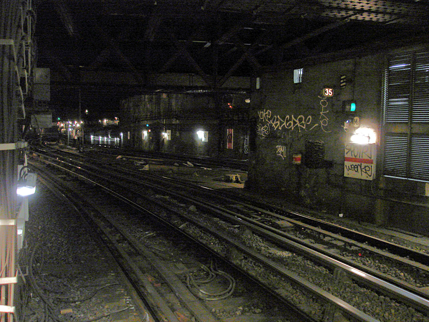 Tunnel à l'ouest de la station Gare de l'Est de la ligne 5 du métro de Paris, France. On distingue le court raccordement de la ligne 7 (au fond) vers la ligne 5, au premier plan.